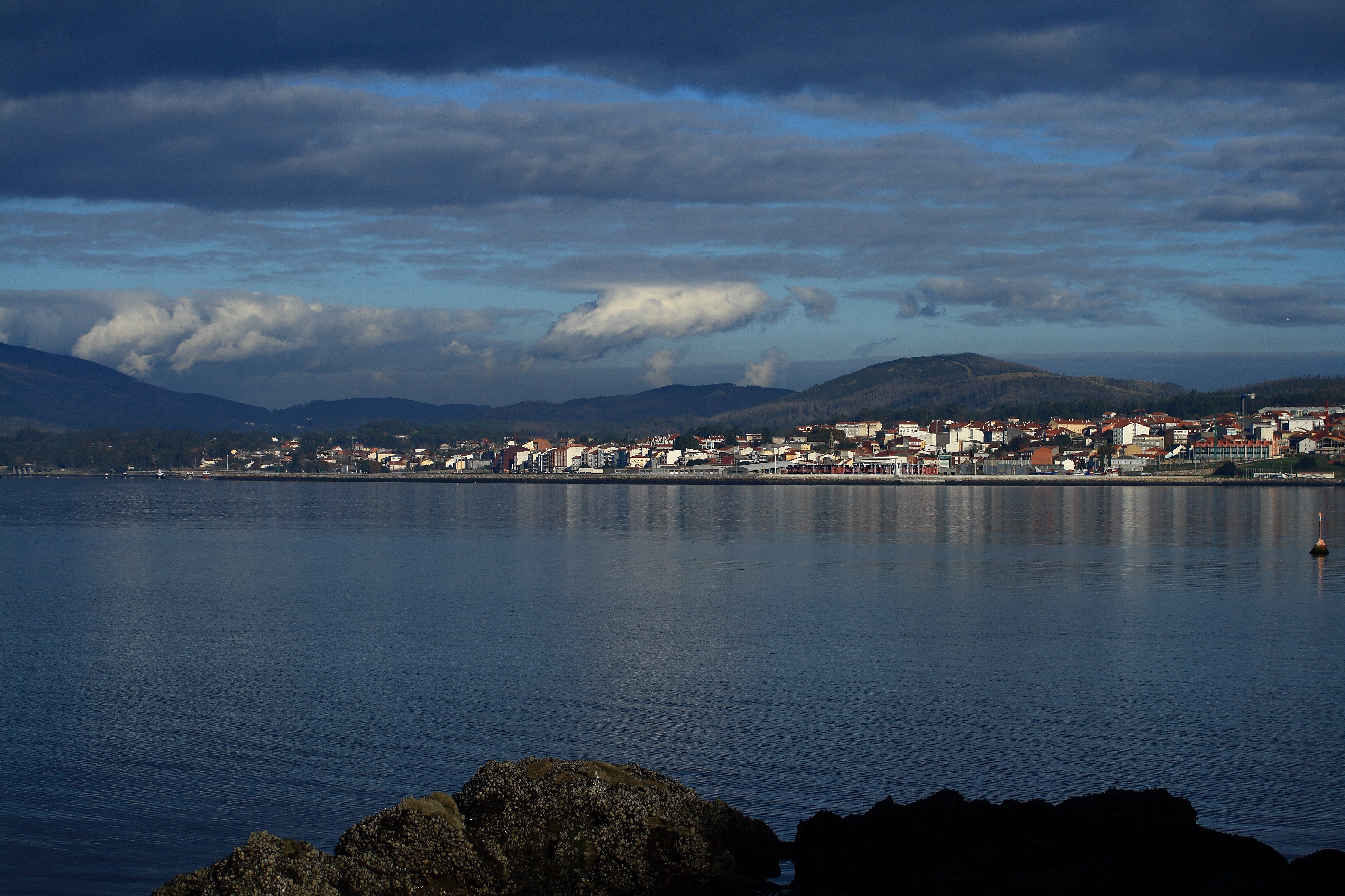 Rianxo e ría de Arousa